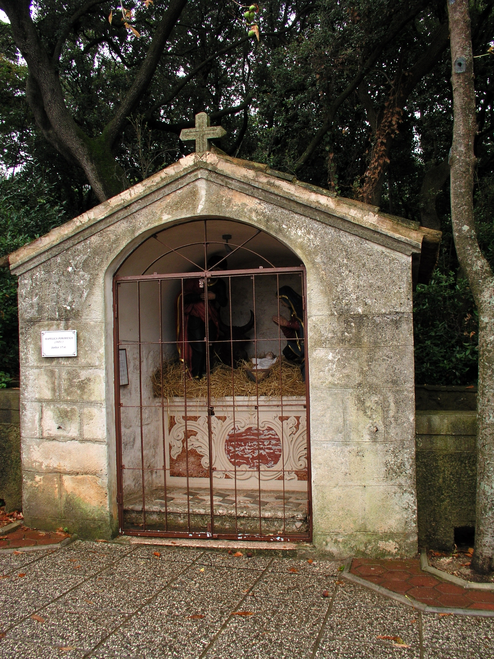 La cappella della natività del monastero nell'isoletta di Košljun